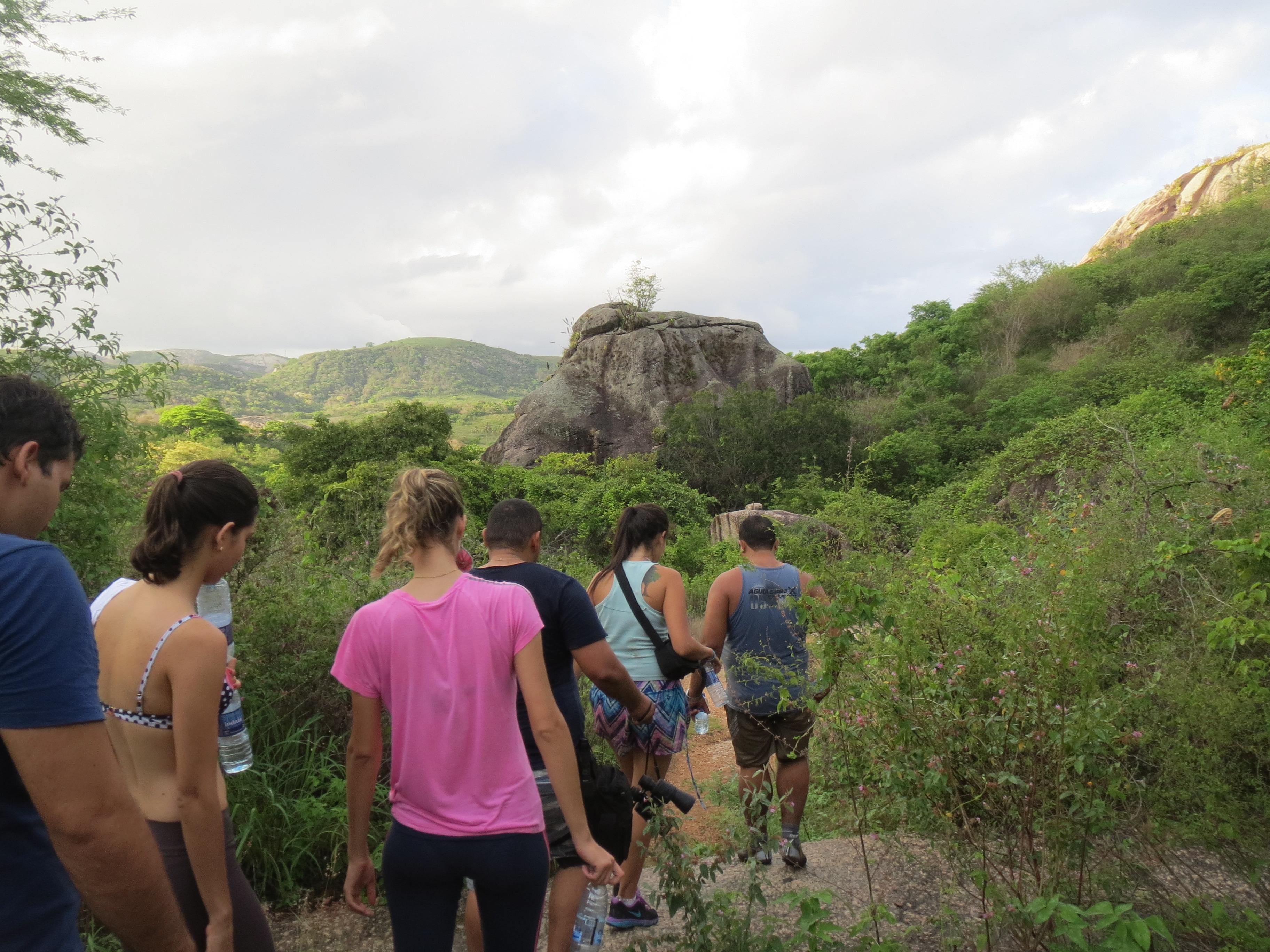 O Parque Estadual da Pedra da Boca é muito visitado por jovens que gostam de fazer trilhas ecológicas.